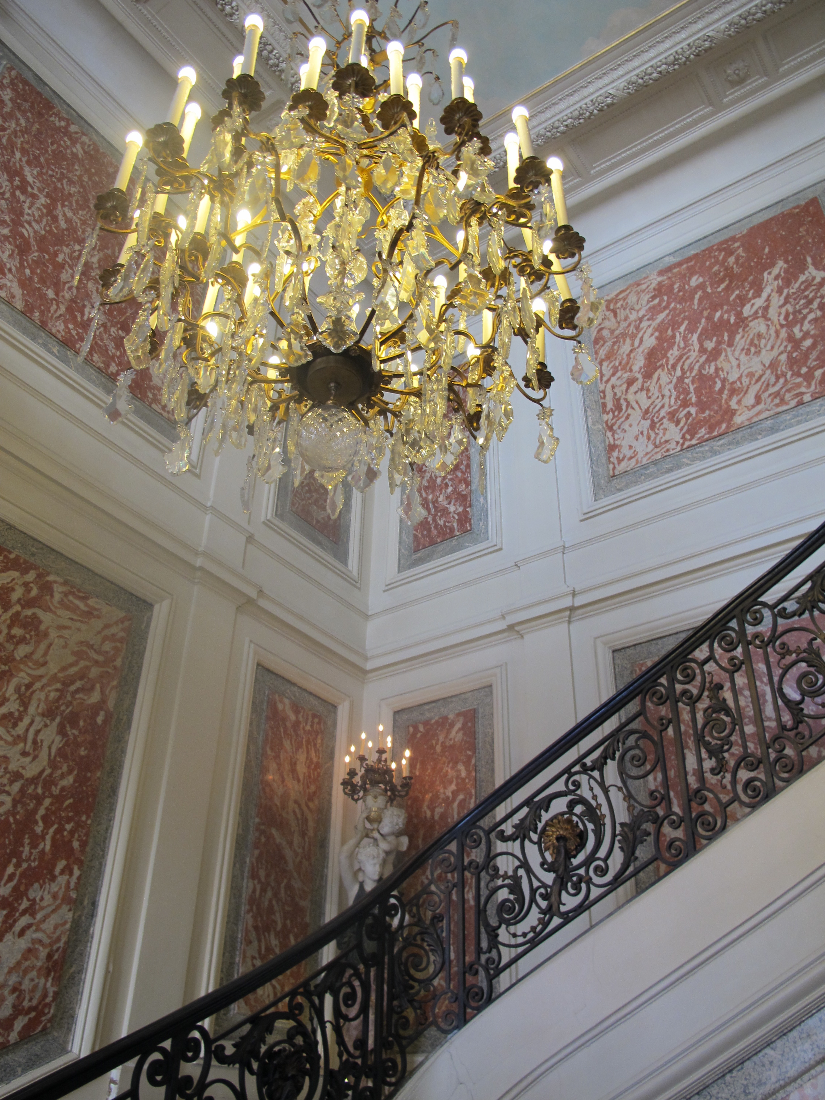 Escalier d'honneur de l'hôtel de Beauvau (ministère français de l'Intérieur). Photo prise à l'occasion des journées européennes du patrimoine 2012.